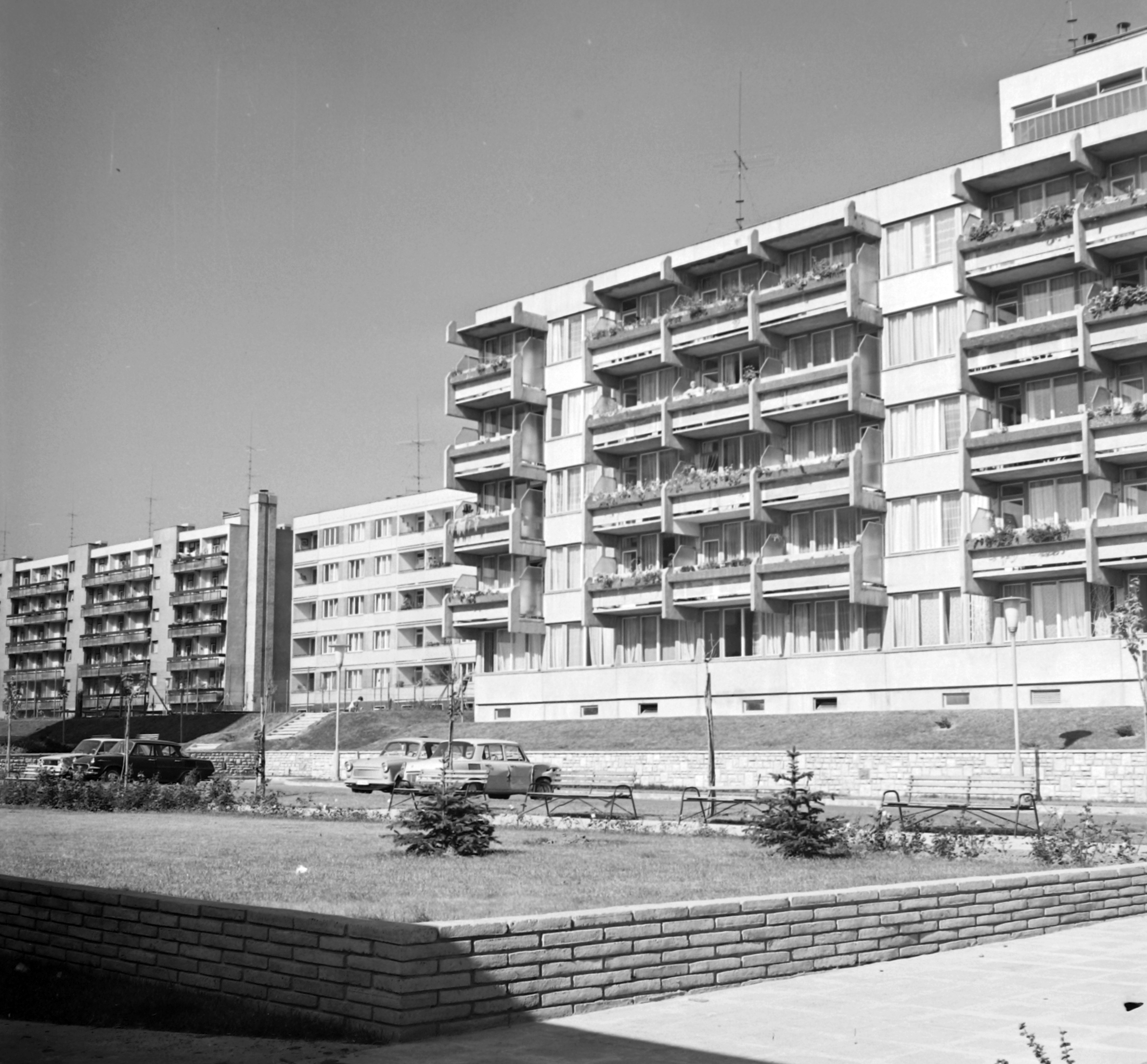 Budafok, József Attila utcai kísérleti lakótelep. Location: Hungary, Budapest XXII. Tags: blocks, balcony, Budapest Title: Budafok, József Attila utcai kísérleti lakótelep.